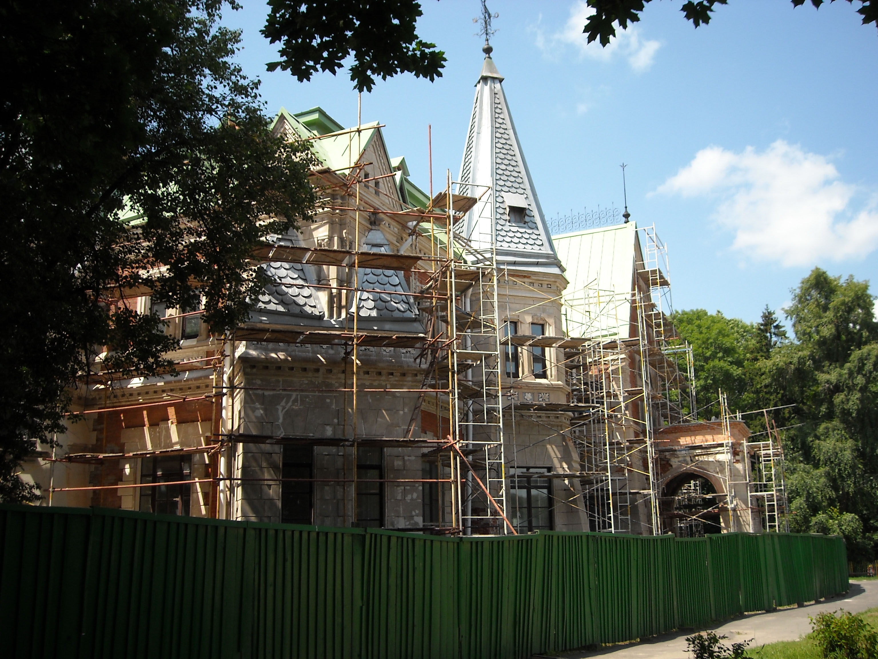 Беларуская (тарашкевіца): Палацава-паркавы комплекс Козелаў-Паклеўскіх. в. Красны Бераг This is a photo of Belarusian heritage monument. Reference number: 312Г000324 ( WLM)